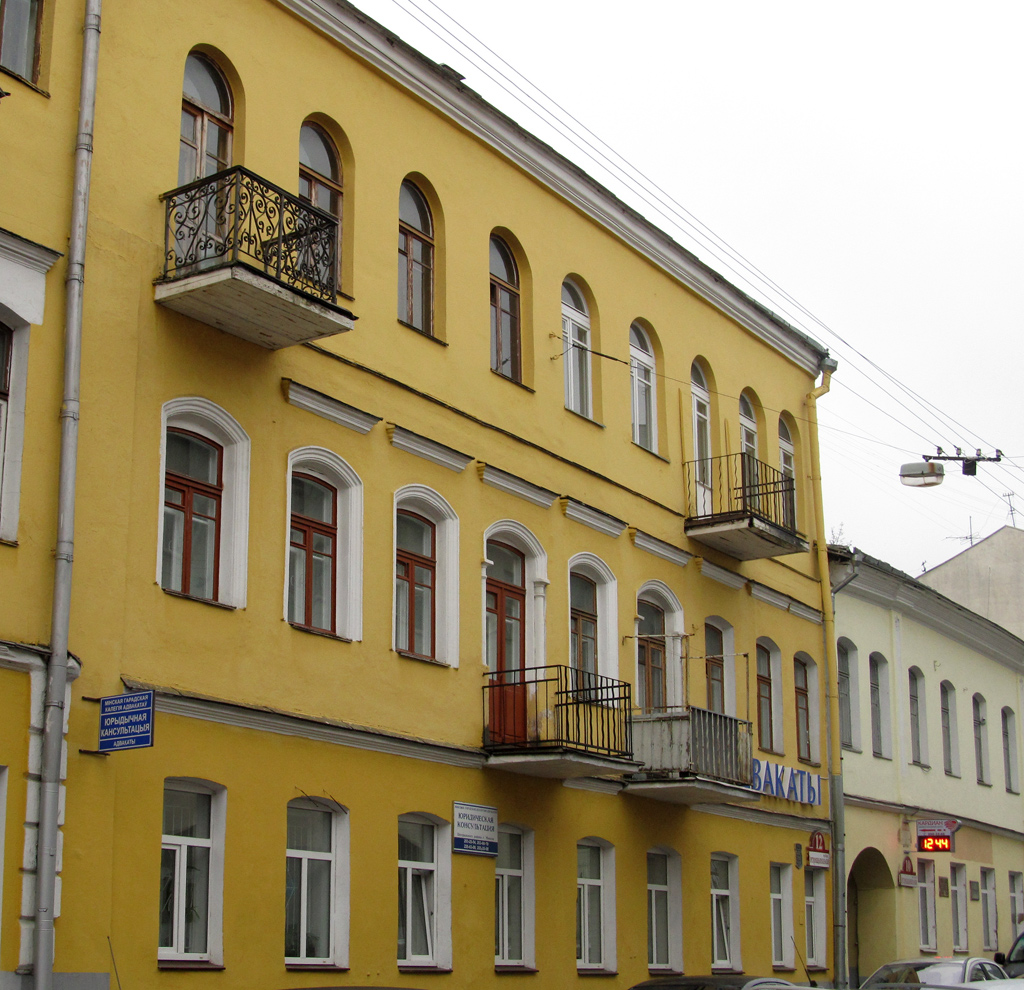 Мінск. Вуліца Інтэрнацыянальная, 12